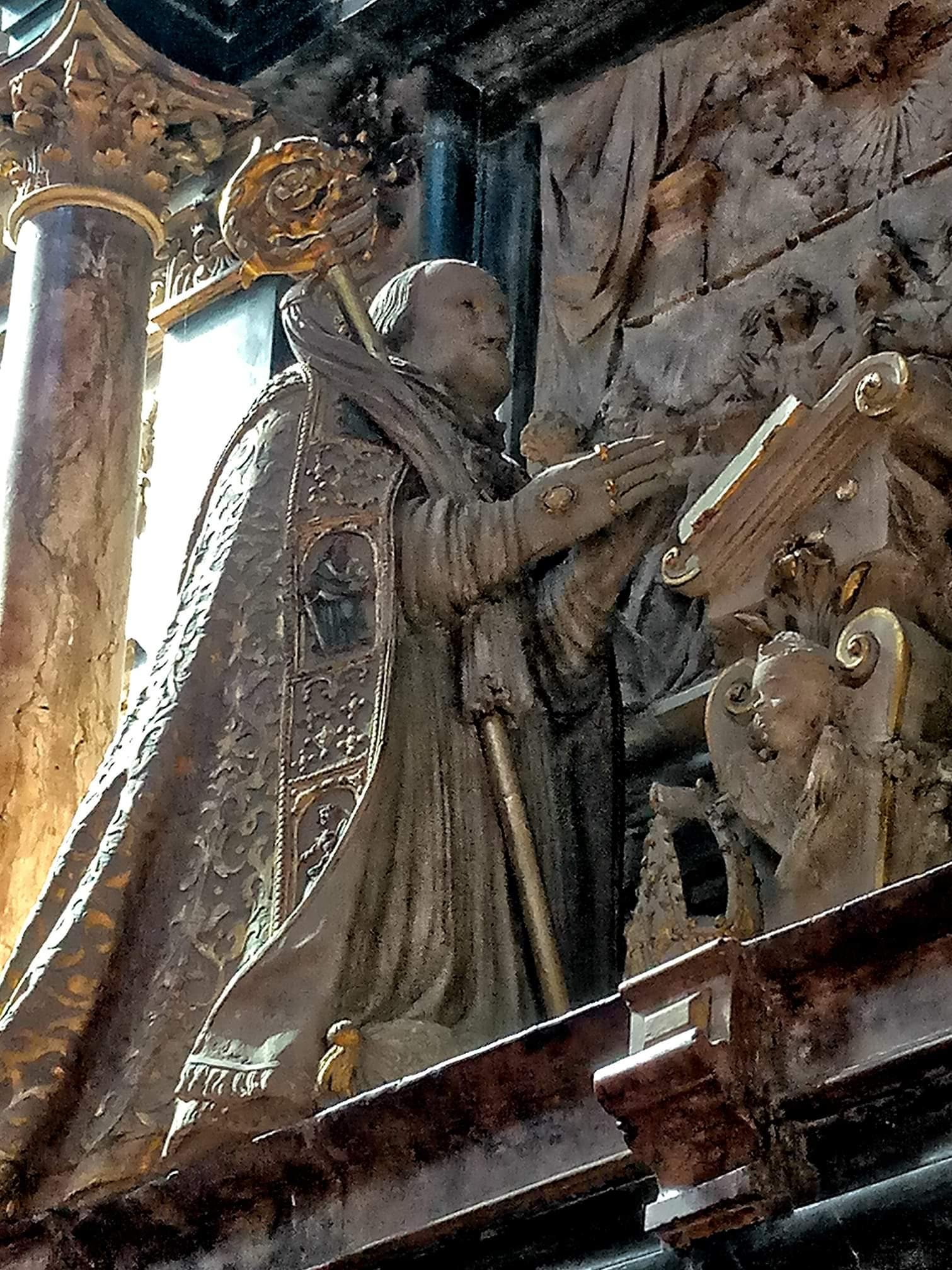 Georg von Schönenberg (+1595), Bischof von Worms, Grabdenkmal Mainzer Dom